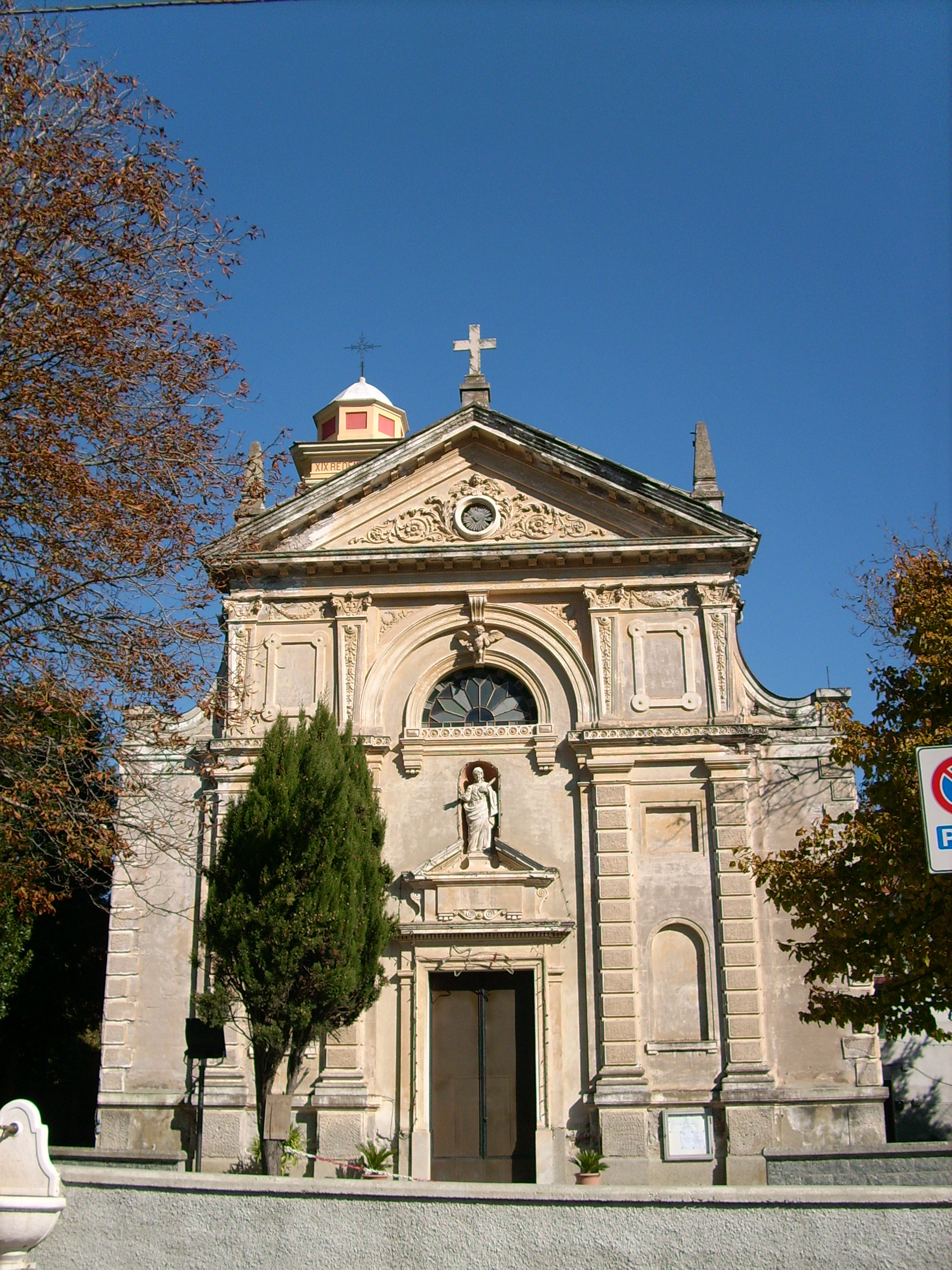 Chiesa di Santa Giustina presso Stella Santa Giustina, Liguria, Italia.